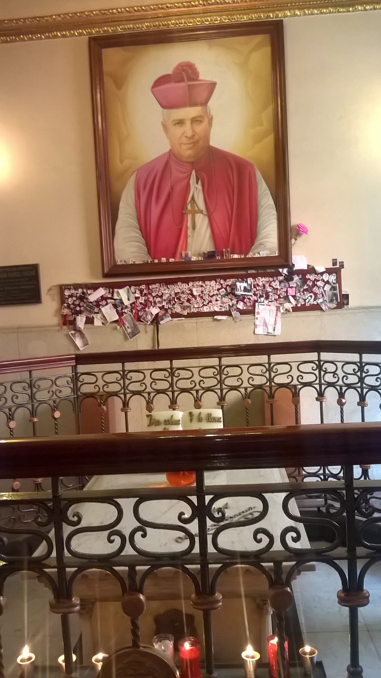 Tumba de San Rafael Guízar y Valencia en Xalapa, Veracruz, México